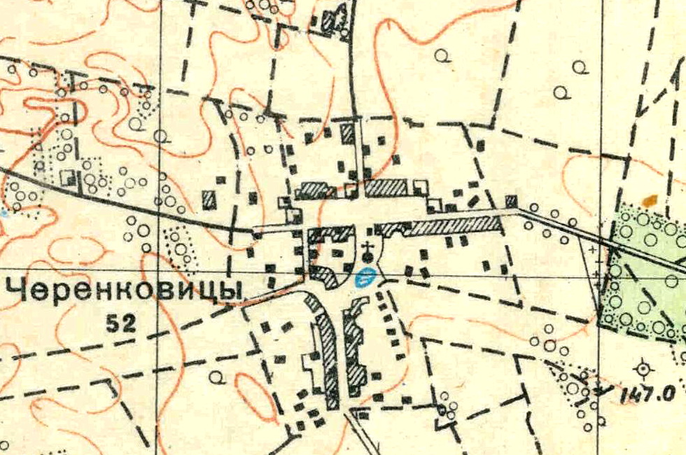 Топографическая карта Ленинградской области, квадрат О-35-23-А-г (Черенковицы), деревня Черенковицы